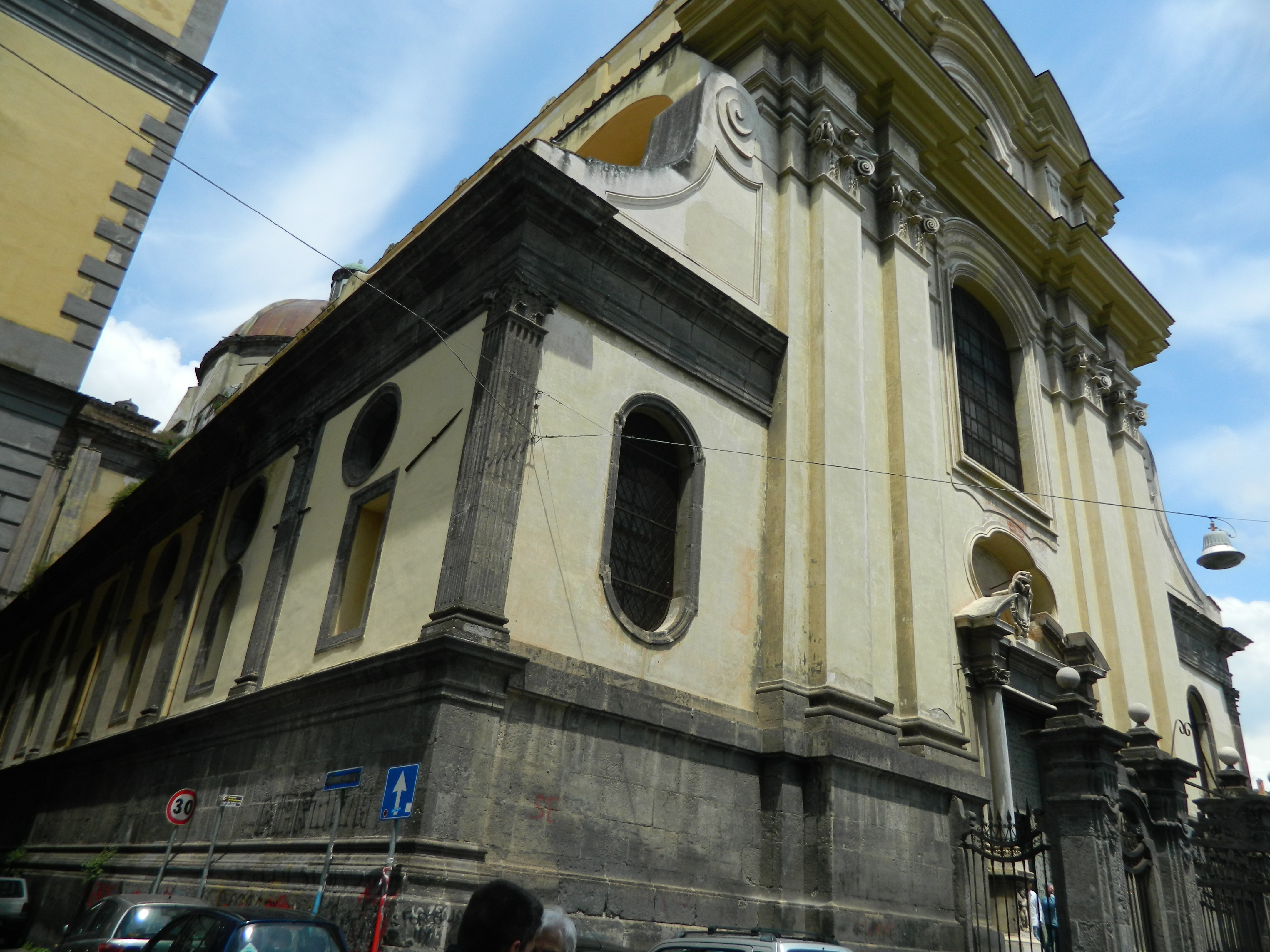 Chiesa dei santi Severino e Sossio di Napoli - Facciata